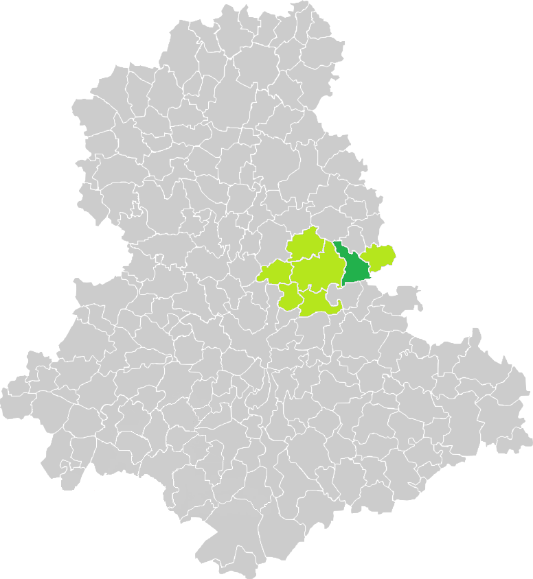 Carte de situation de la commune de Saint-Laurent-les-Églises (en vert foncé) dans le votre Canton (en vert clair) sur une carte des communes de la Haute-Vienne